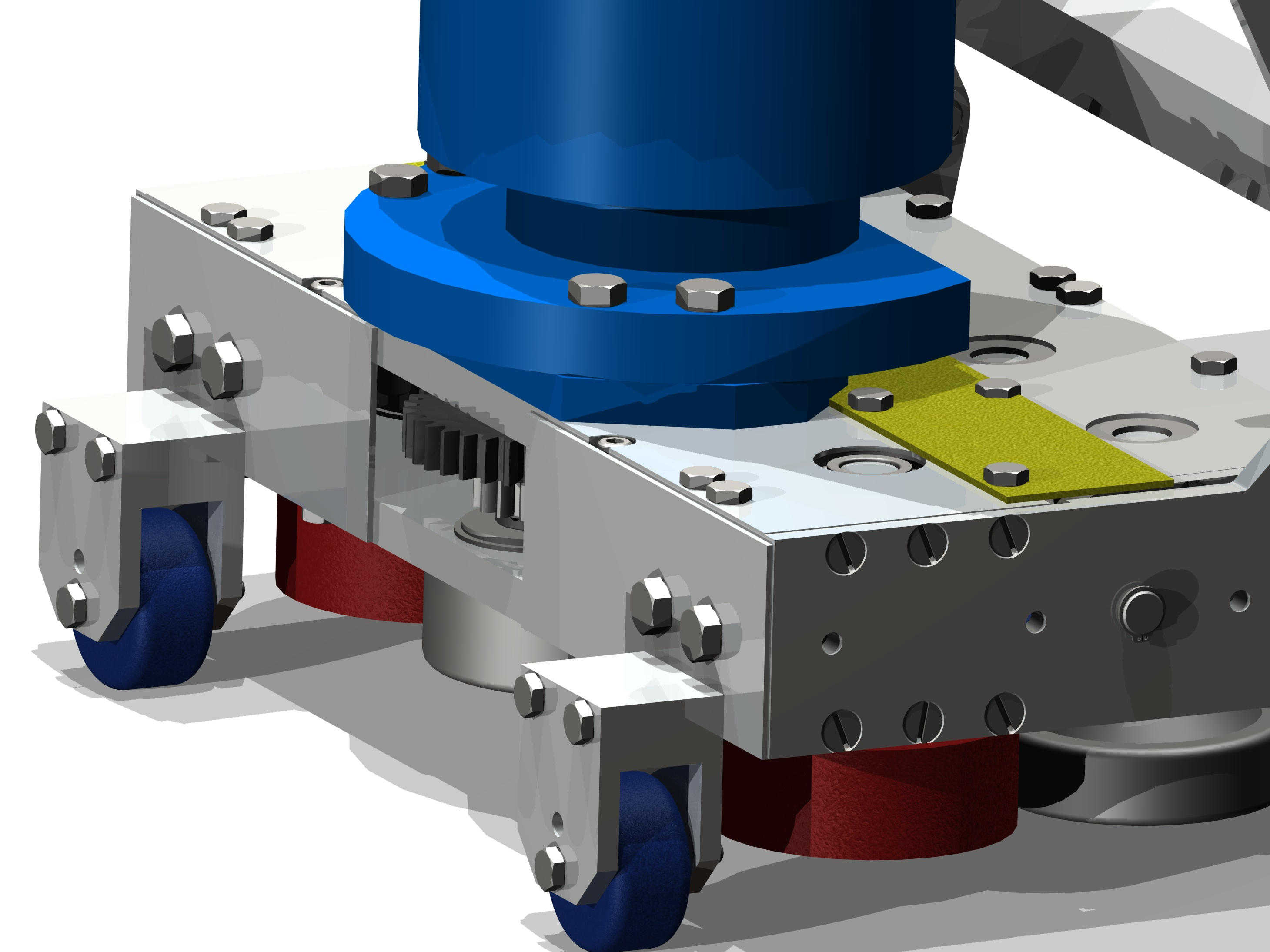 Ejemplo de modelado 3d mecánico y render